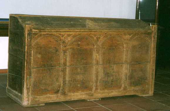 Kornbyre fra 11-1200-årene, fra Horg i Sør-Trøndelag. Lengde 192 cm. Foto Anne-Lise Reinsfelt, Norsk Folkemuseum, NF.1931-0135.